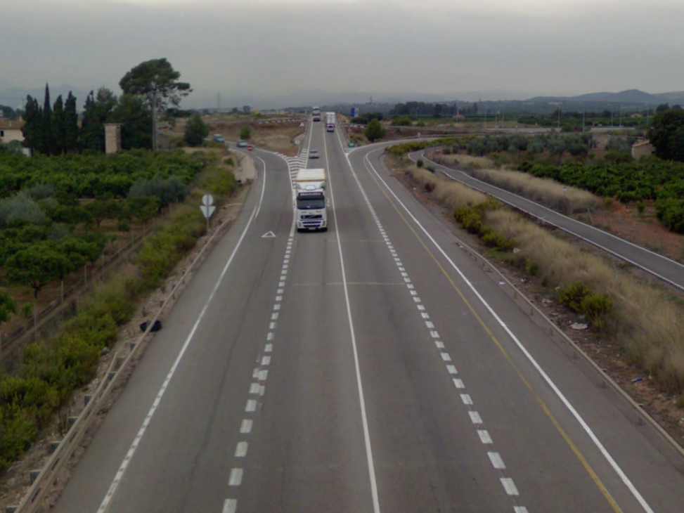 Imagen de la carretera CV-17 en Castellón, España